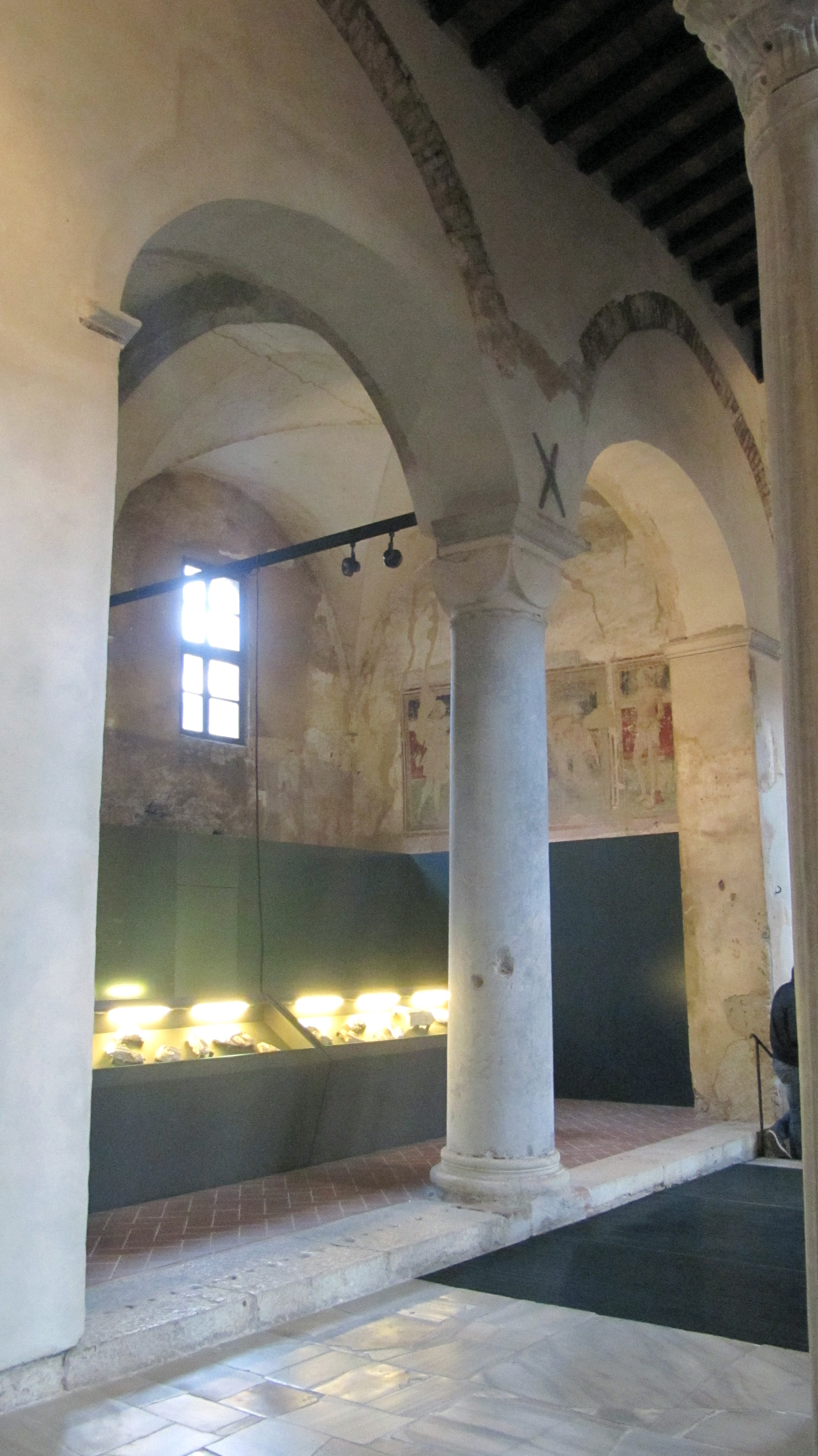 Cappella di San Giovanni Battista (ex chiesa di San Salvatore, Brescia, XIV-XV sec)